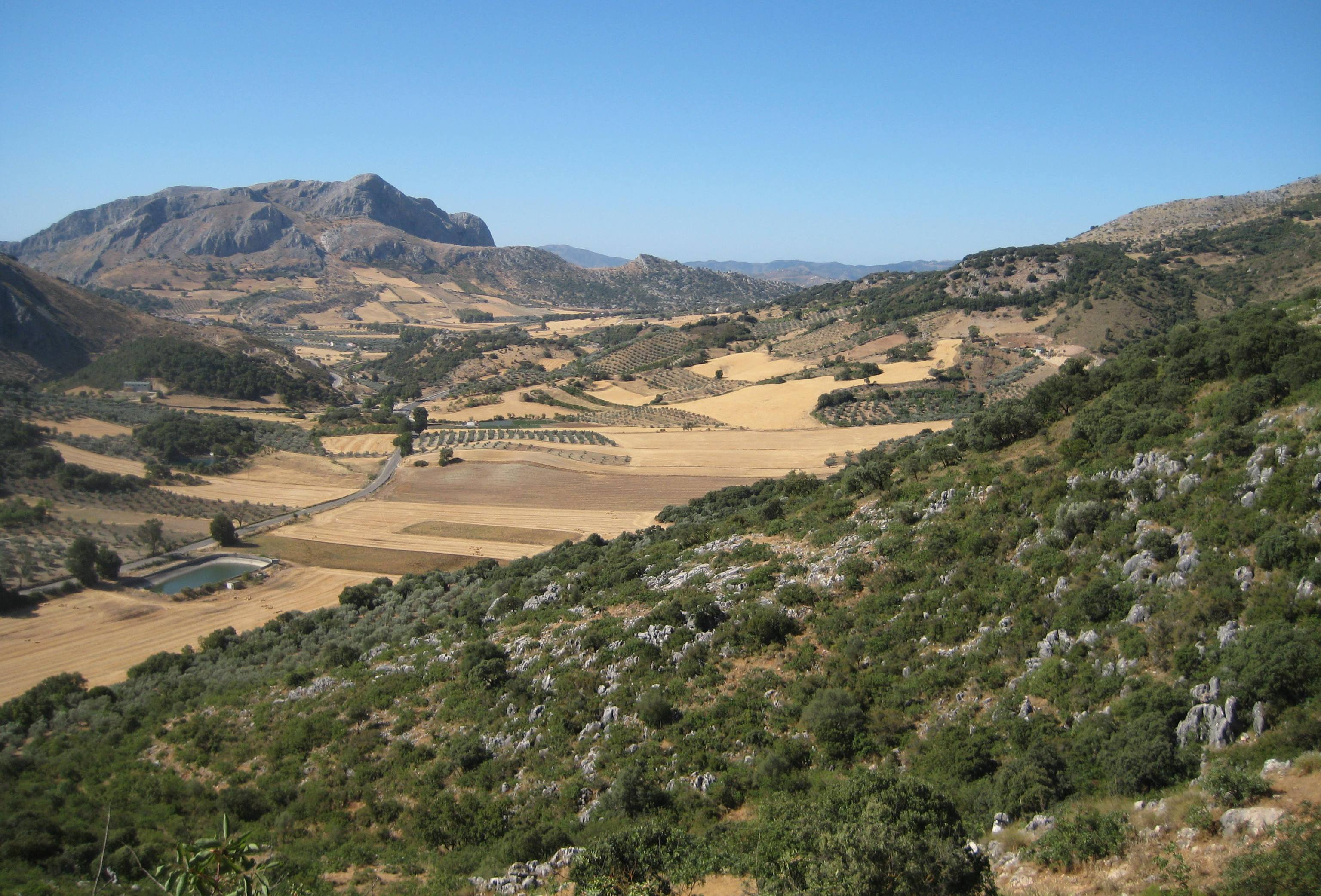 Tierras cercanas a Alfarnate